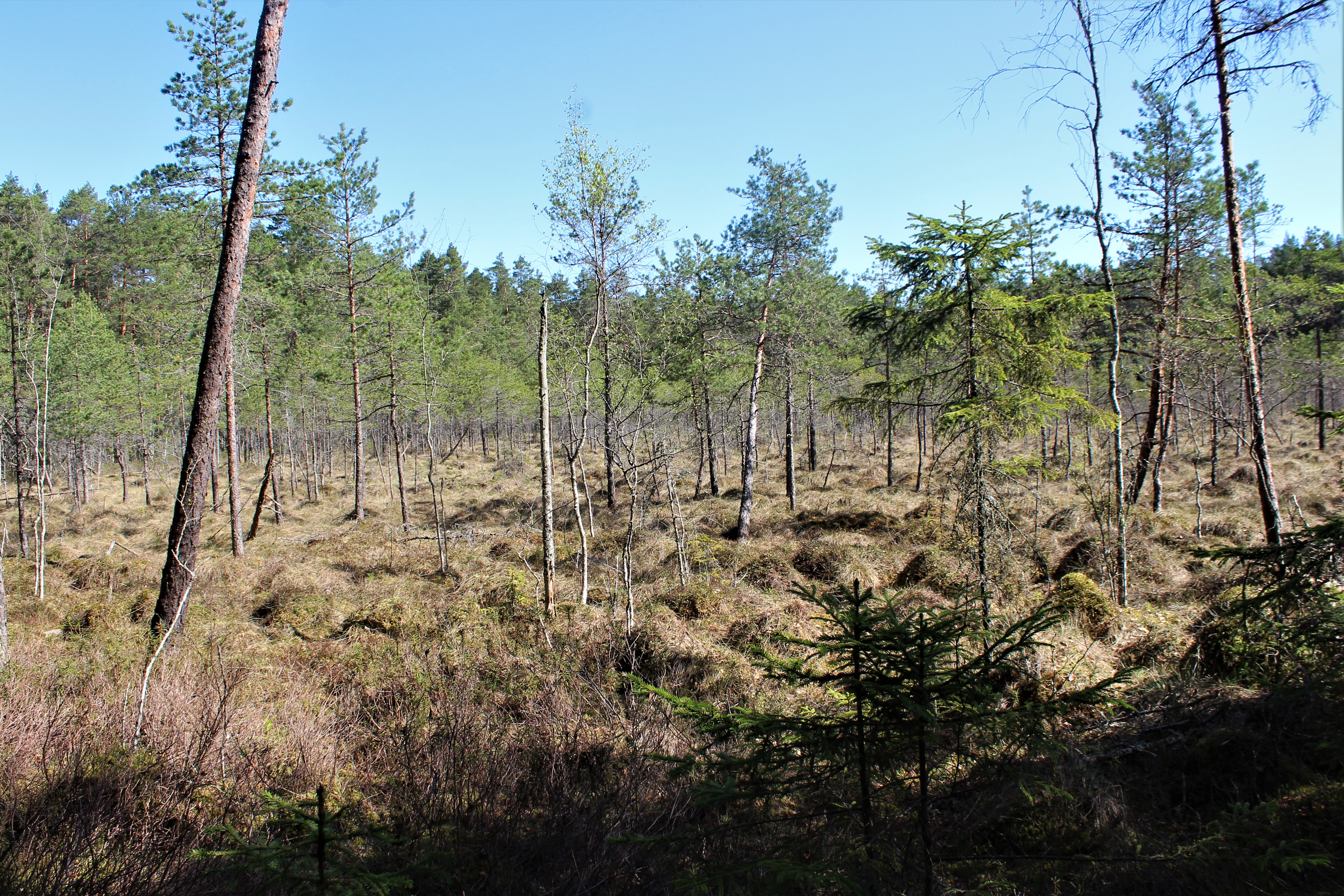 Dulbju acs purva dabas lieguma dienvidu daļa - pats Dulbju acs purvs ilgstoši sausā laikā.